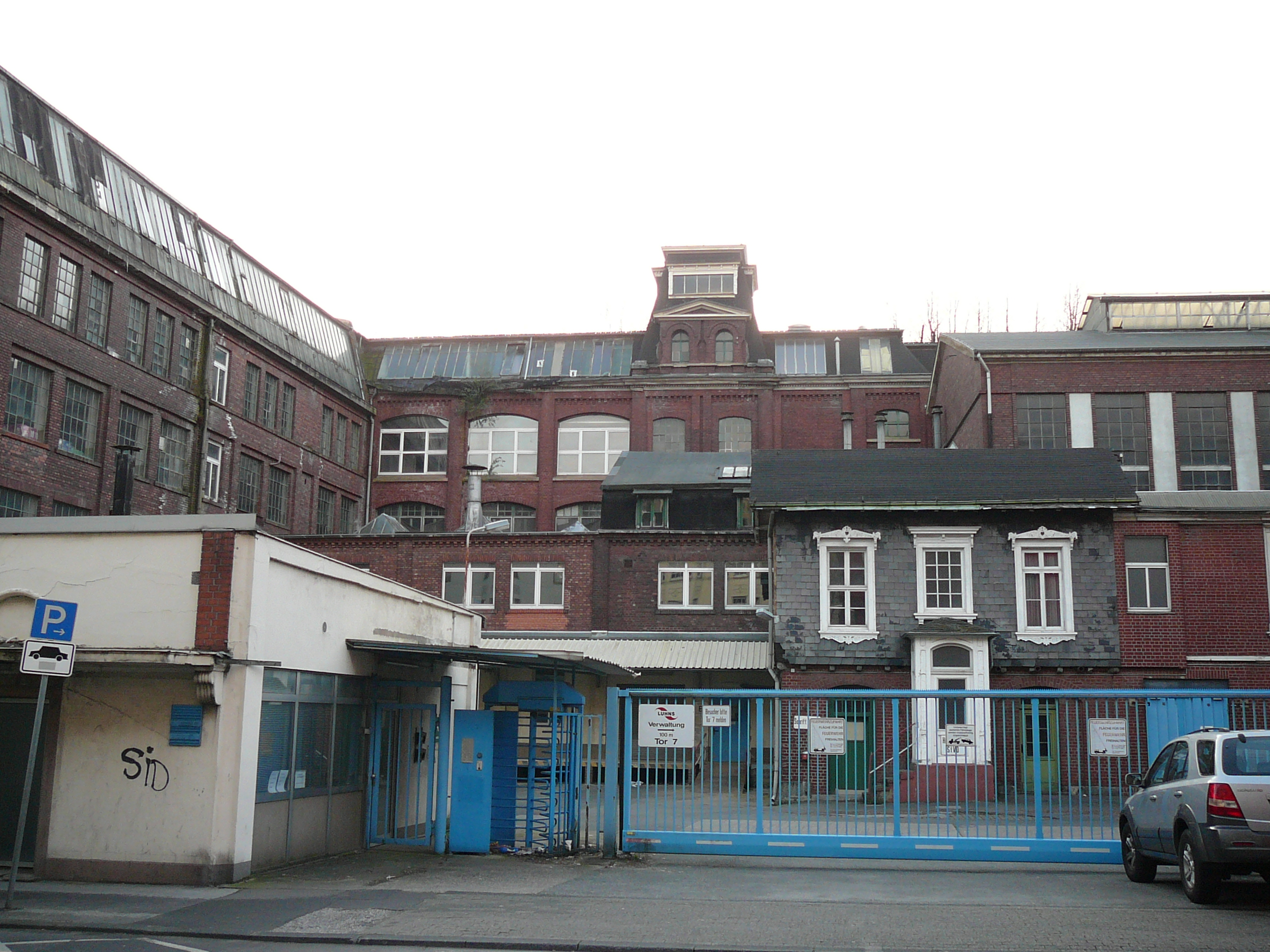 Schwarzbach, Wuppertal/Oberbarmen